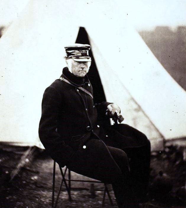 Lieutenant General Sir W.J. Codrington, K.C.B., 1855 Salt print